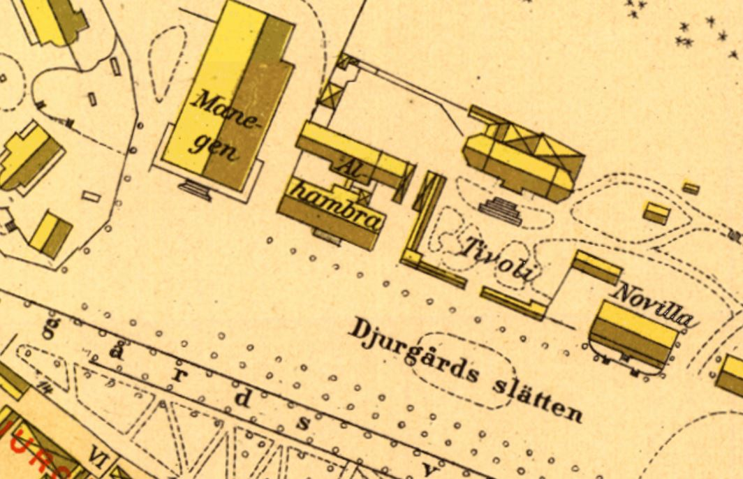 Manegen och Alhambra samt Novilla på del av A.R. Lundgrens Stockholmskarta